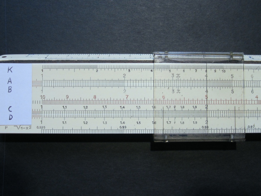 Rechenschieber mit Skalenbezeichnung und Läuferstrich auf D 2